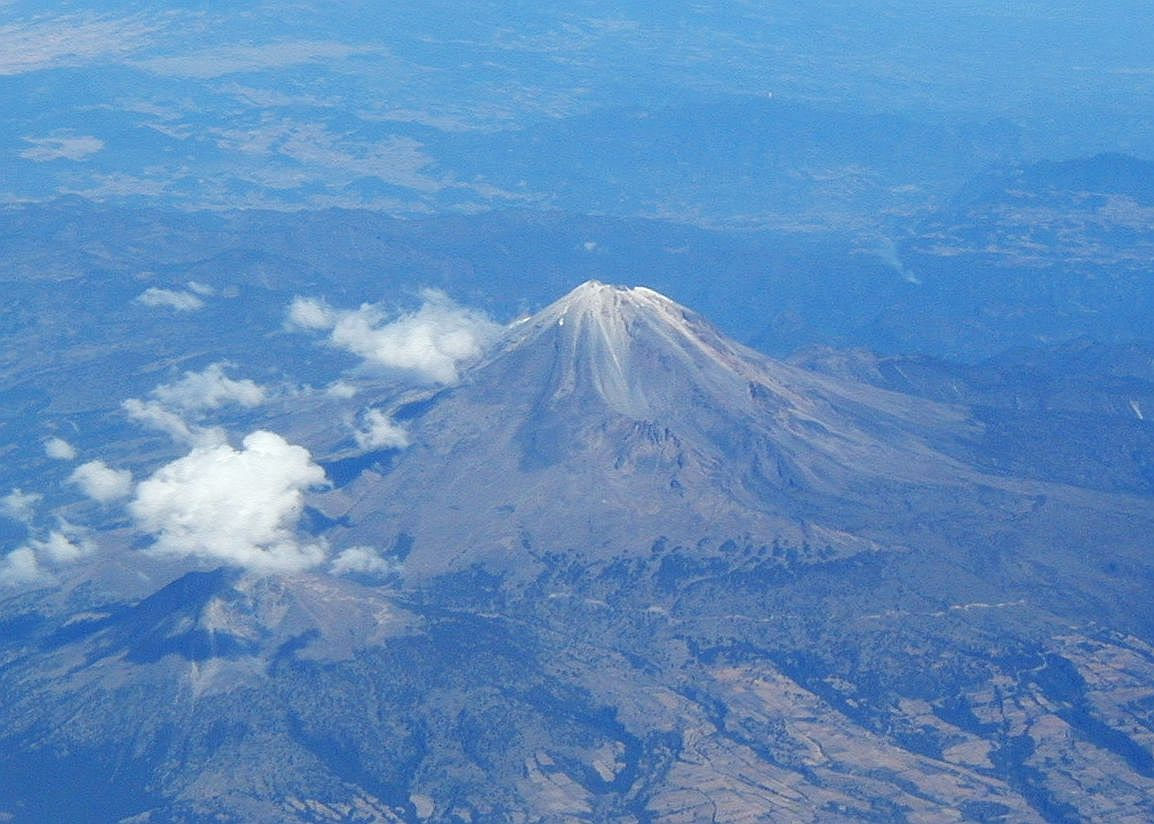 Aerial photo of Pico de Orizaba